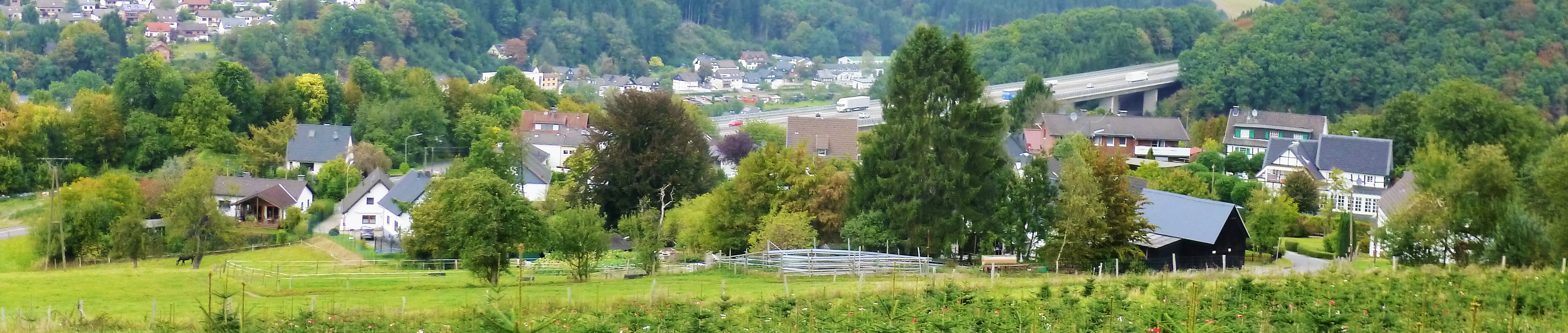 Oberschelmerath